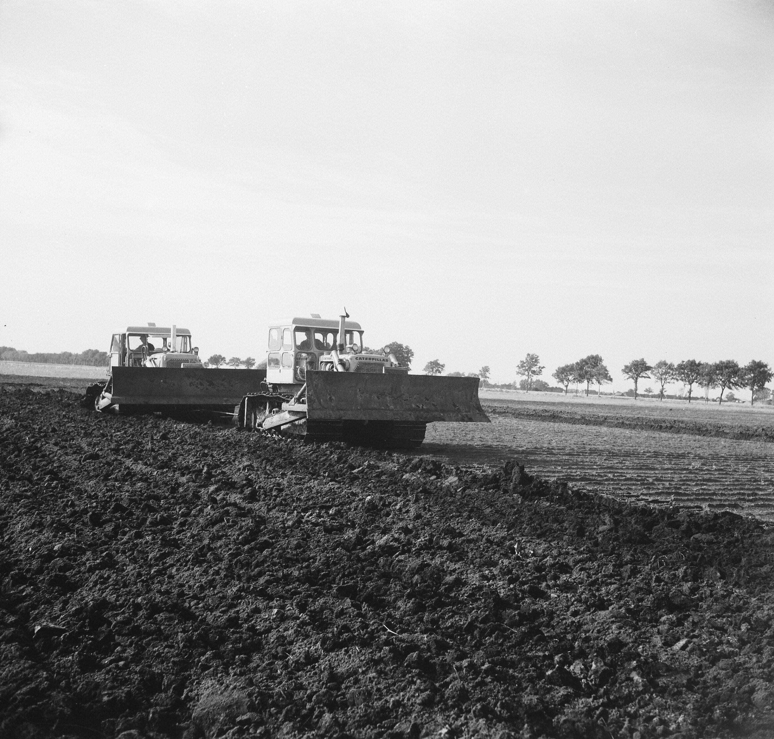 Collectie / Archief : Fotocollectie Anefo Reportage / Serie : [ onbekend ] Beschrijving : Menggootwoeler (nieuwe aanwinst voor grondverbetering (in bedrijf)) Datum : 27 september 1965 Trefwoorden : bedrijven, grondverbeteringen Fotograaf : Buiten, Klaas van / Anefo Auteursrechthebbende : Nationaal Archief Materiaalsoort : Negatief (zwart/wit) Nummer archiefinventaris : bekijk toegang 2.24.01.03 Bestanddeelnummer : 918-2287